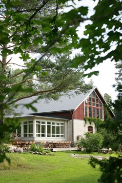 Entisen navetan tiloissa nykyisin: IdeaCallio, Kirjasto, Purje, Idylli